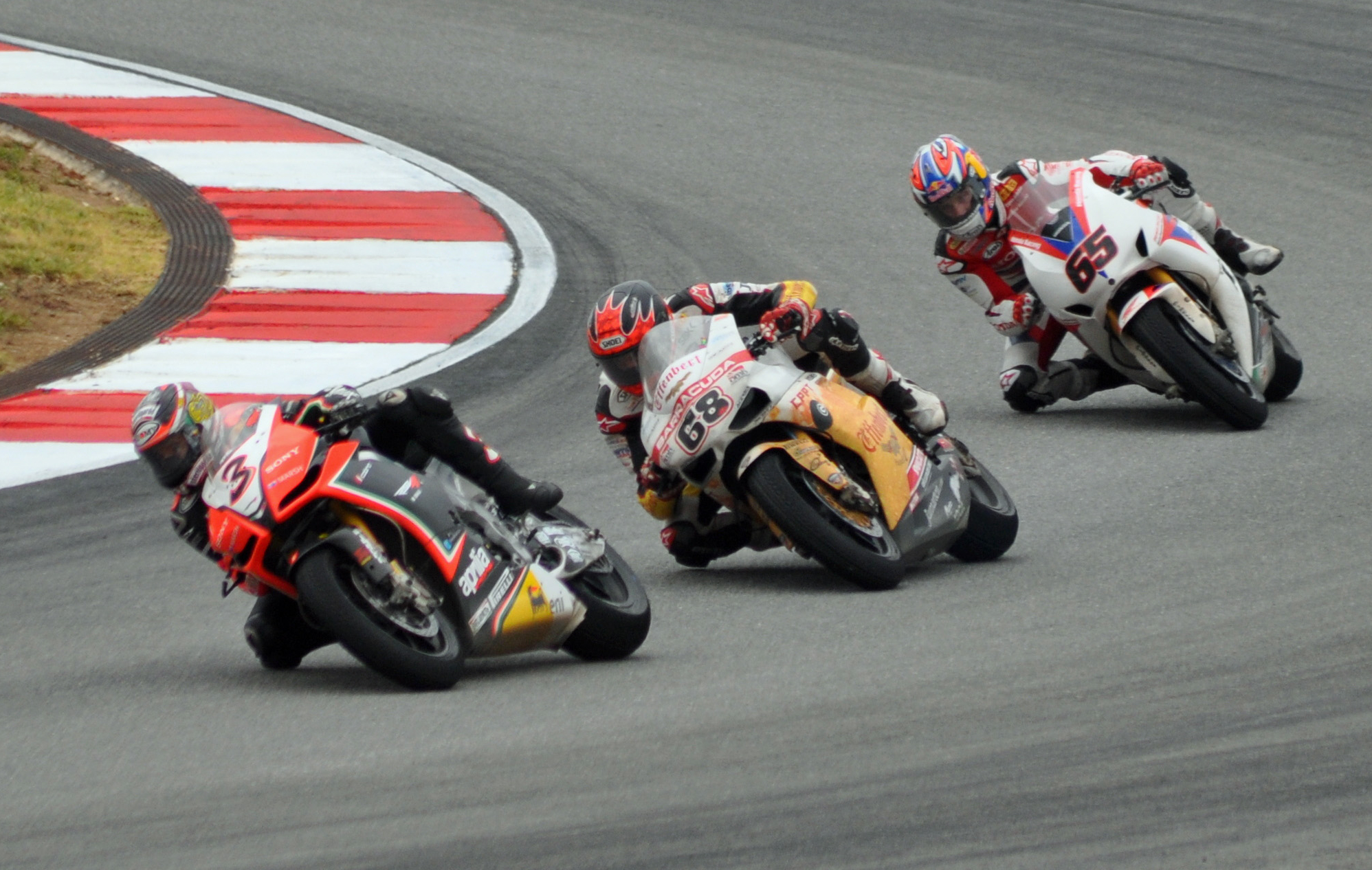 Autódromo Internacional do Algarve (2012-09-23), by Klugschnacker in Wikipedia (67) Max Biaggi (ITA) auf Aprilia, Brett McCormick (CAN) auf Ducati, Jonathan Rea (GBR) auf Honda